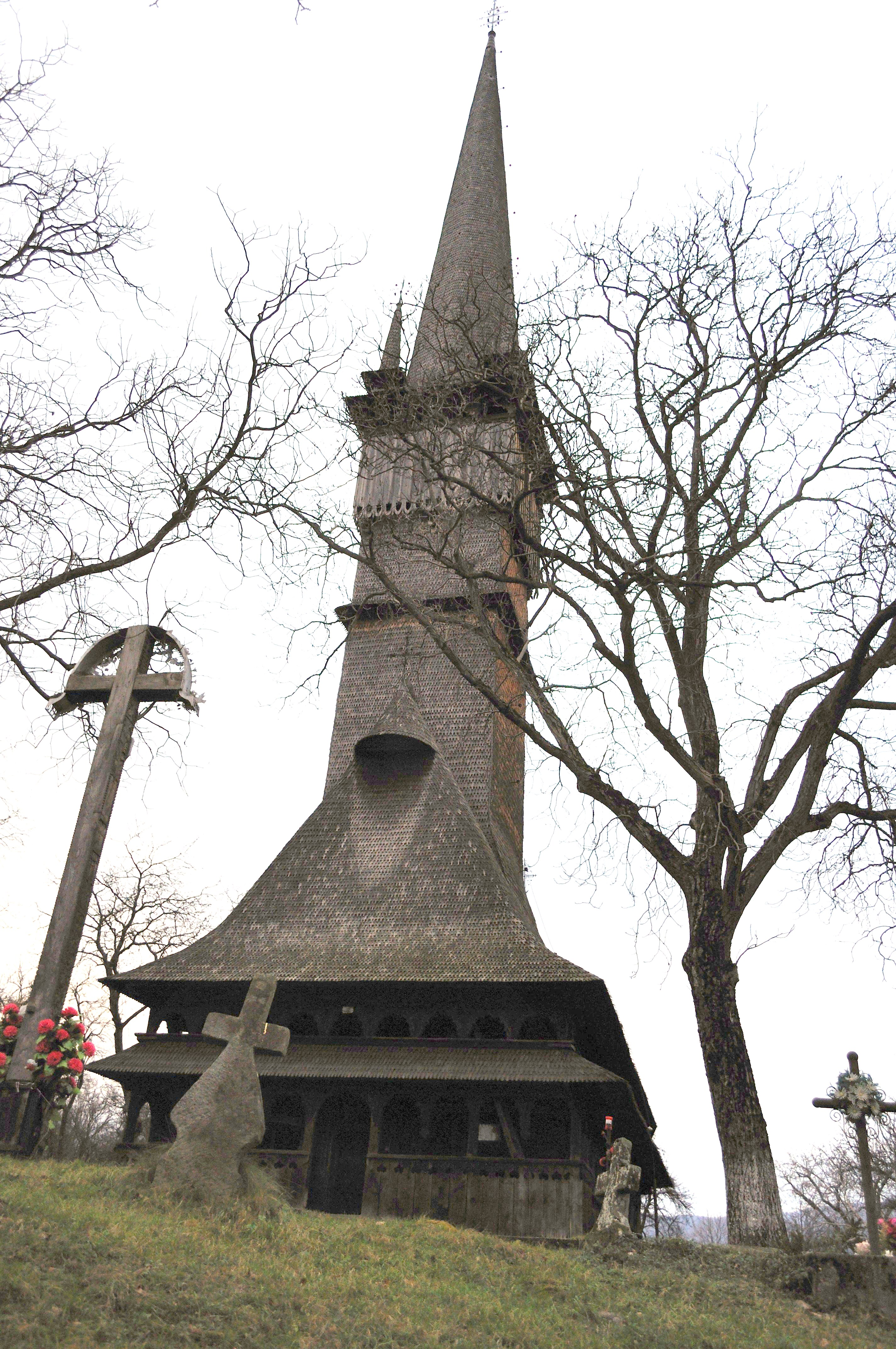 Biserica de lemn „Sfinții Arhangheli Mihail și Gavriil” din Șurdești, județul Maramureș